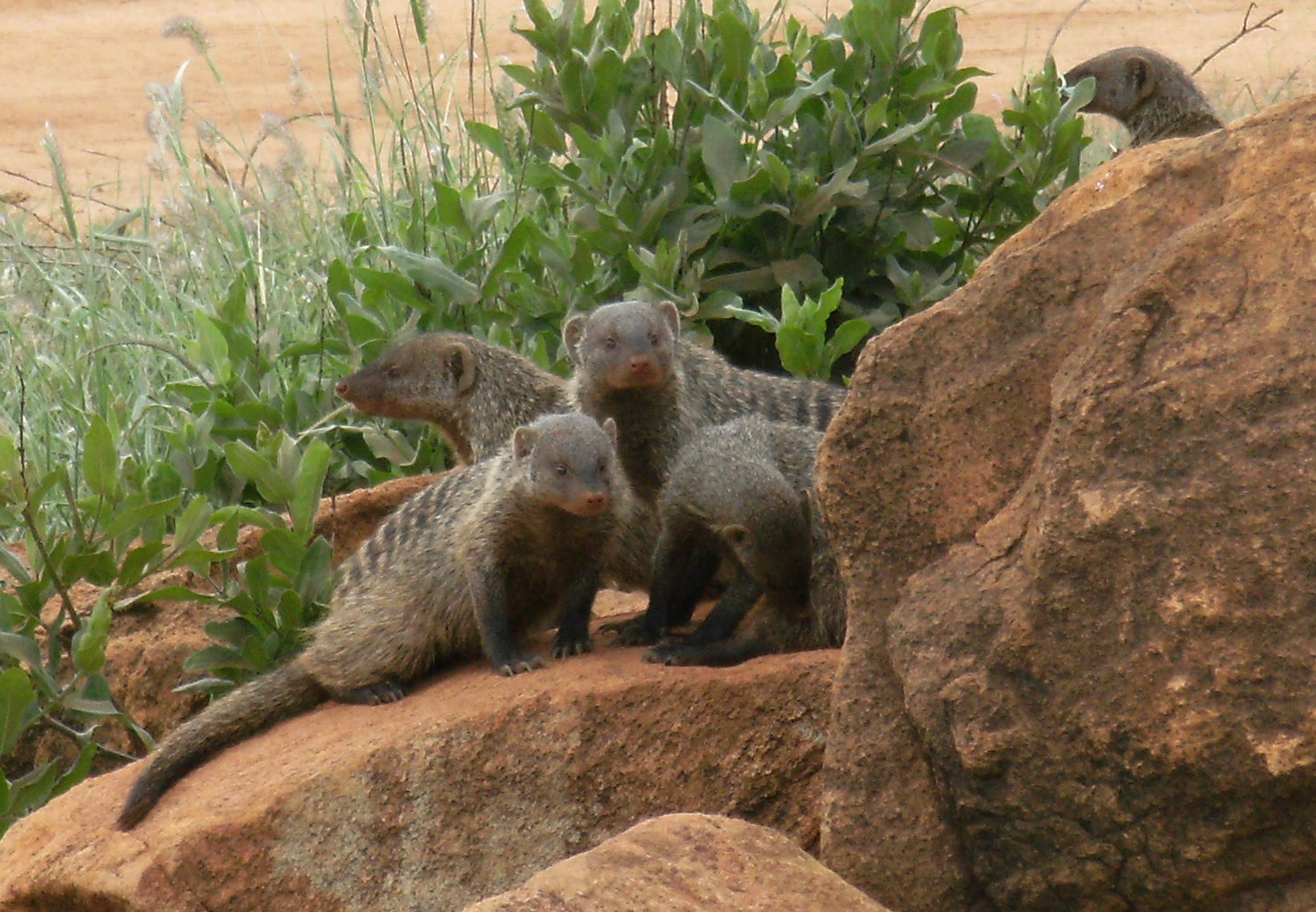 Mungos mungo dans le parc Tsavo east au Kenya